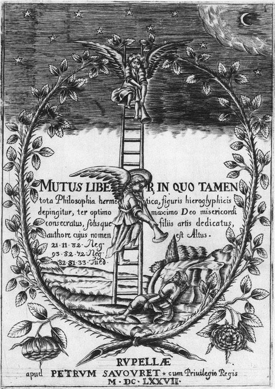 Mutus Liber title page, La Rochelle 1677 edition